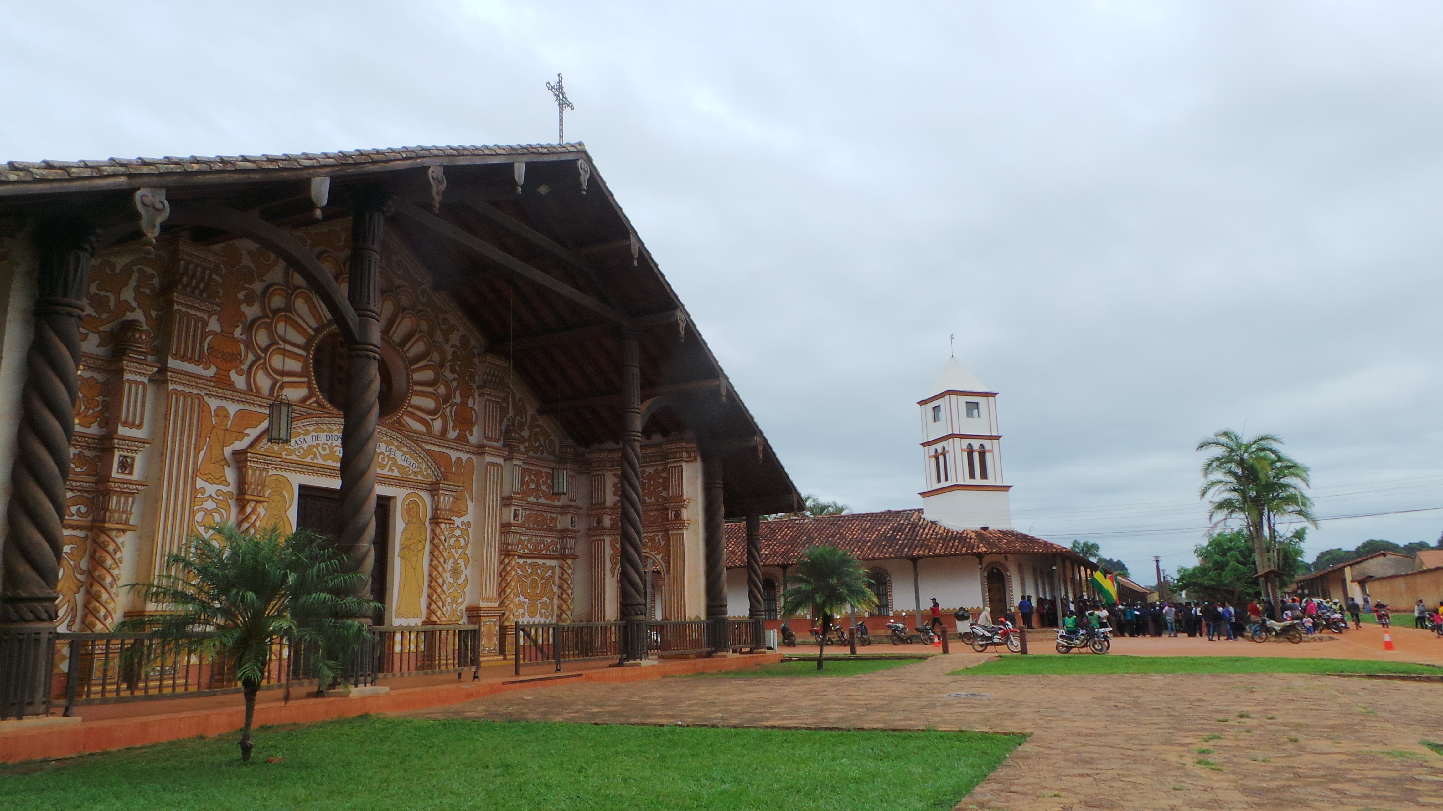 Conjunto Jesuítico Misional Nuestra Señora de La Inmaculada Concepción